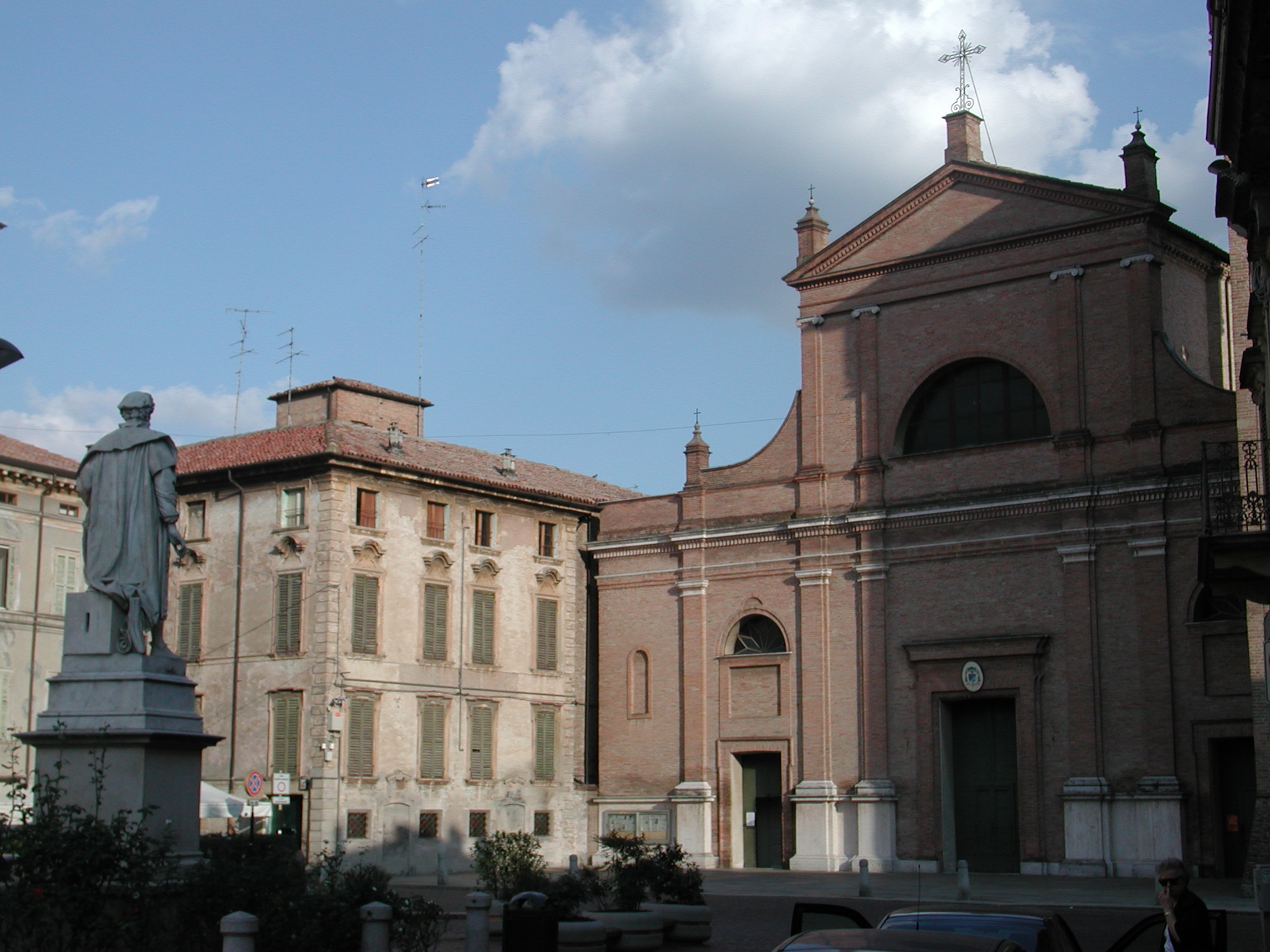 Correggio (Italy) a town near Reggio Emilia, Italy - chiesa san Quirino